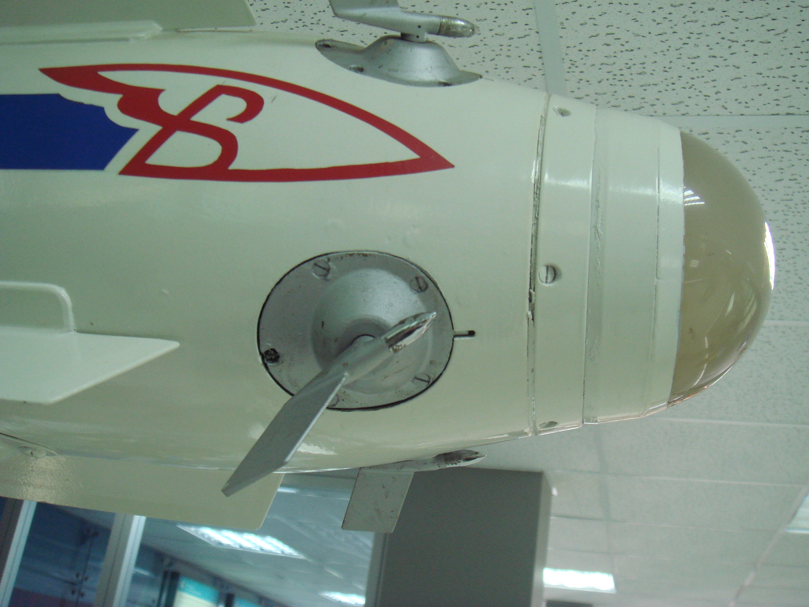 датчики углов атаки на ракете (выставка МАКС2007)